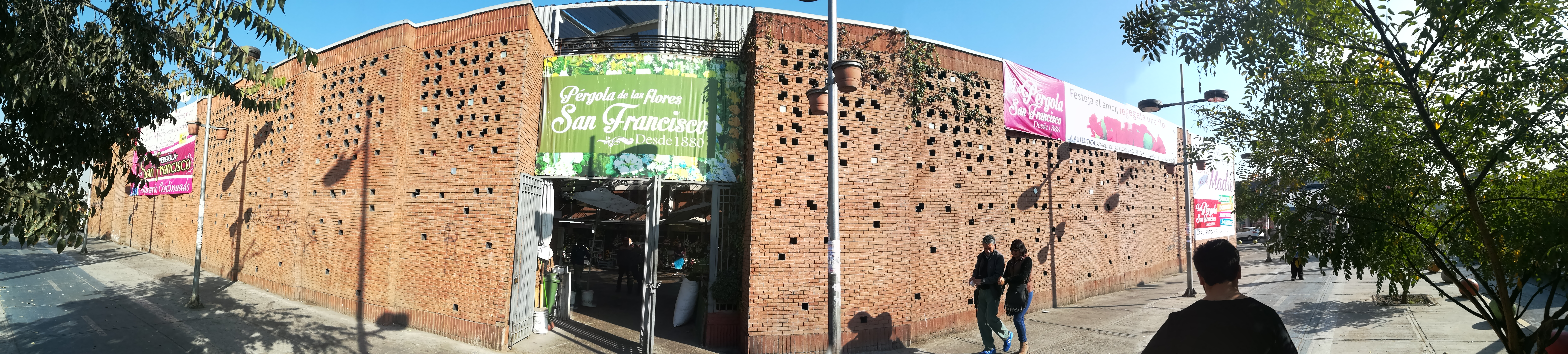 Fachada de la pérgola de San Francisco vista desde Avenida La Paz.